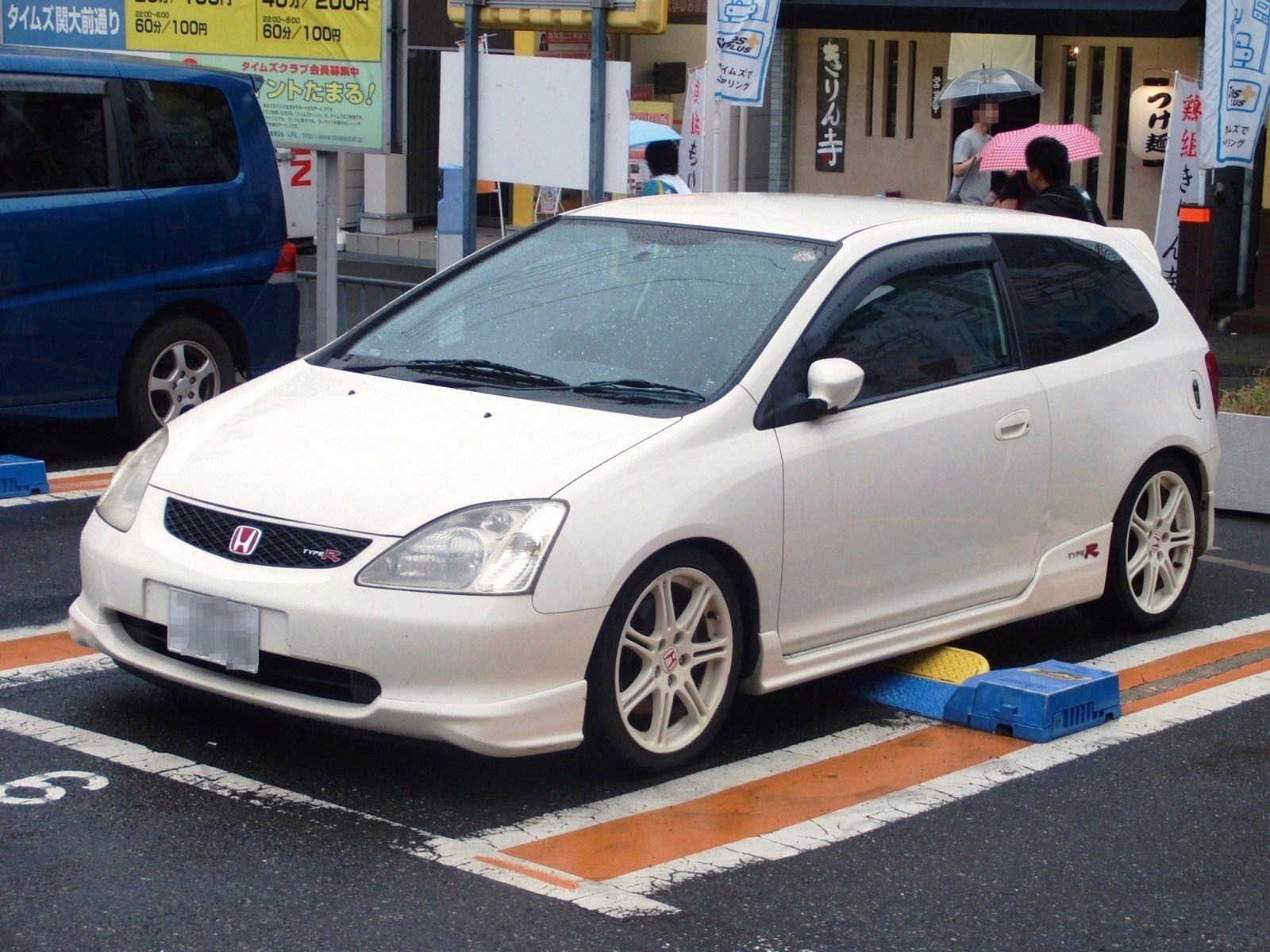 ホンダ・シビックタイプR（EP3型）を撮影